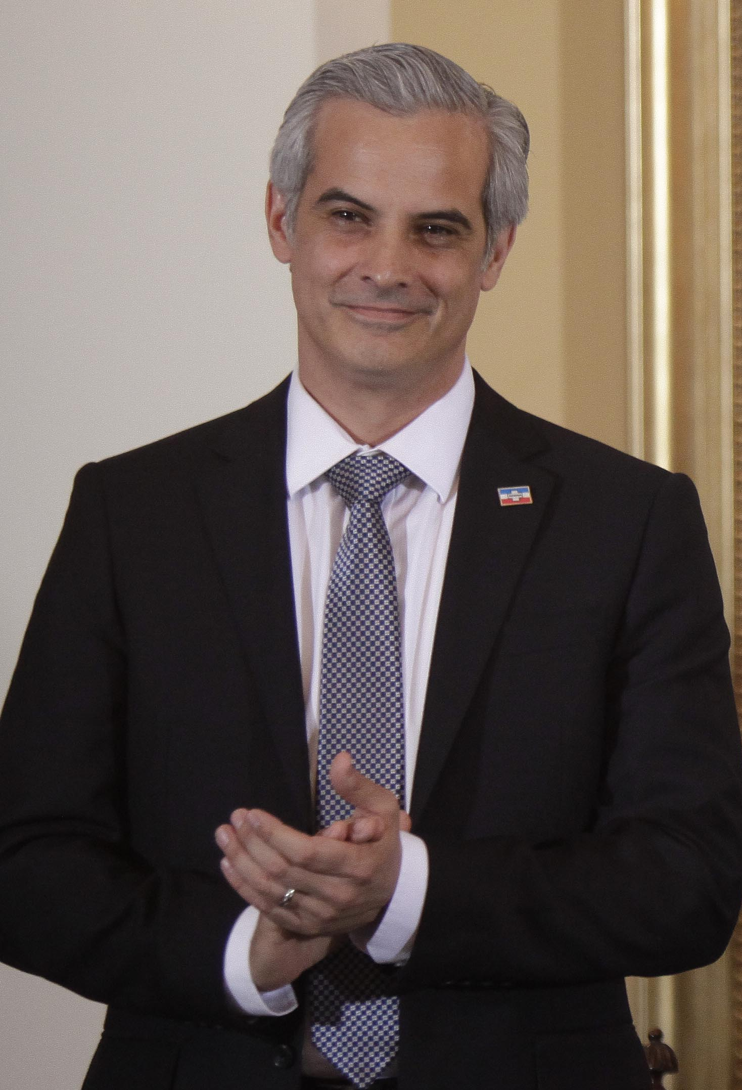 Mauricio Interiano, presidente de ARENA